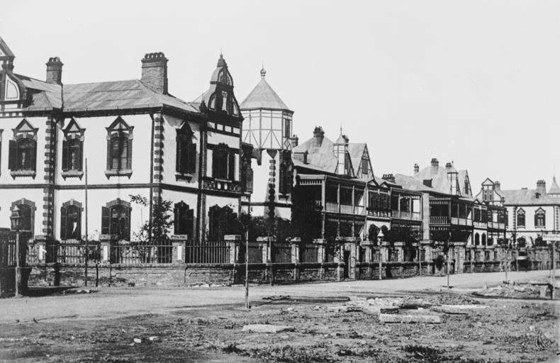 Tientsin, Wilhelmstraße, Ansicht China, Tientsin - Prow. Chihli Tientsin, Wilhelmstrasse